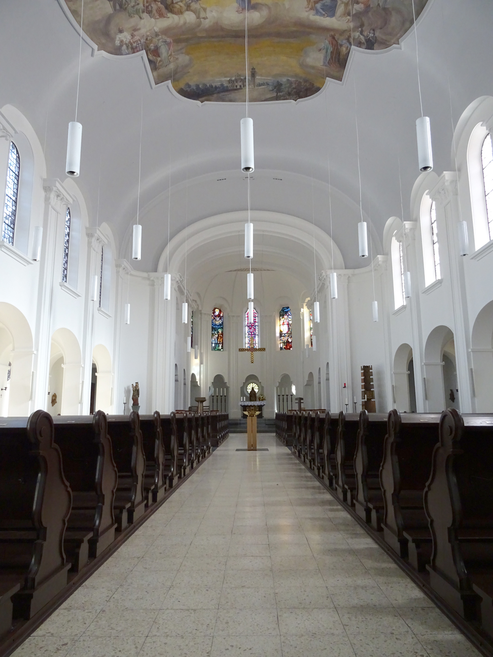 Helle Raumgestaltung durch die Renovierung im Jahre 2018